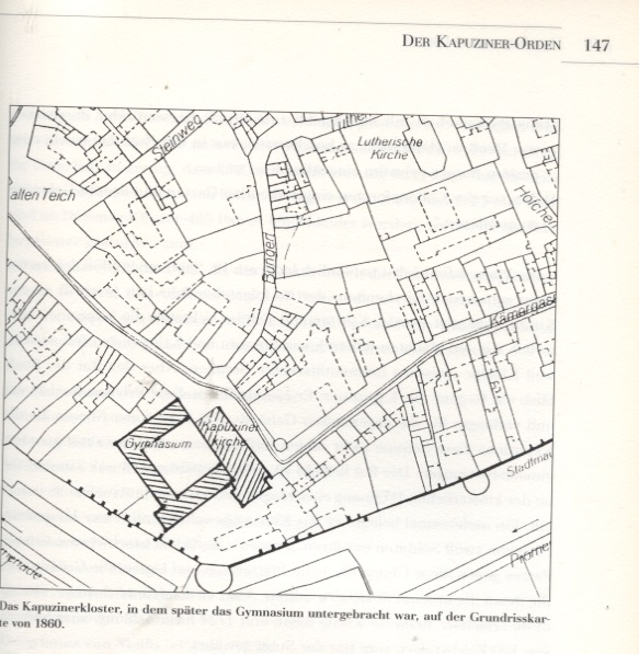 Das Kapuzinerkloster